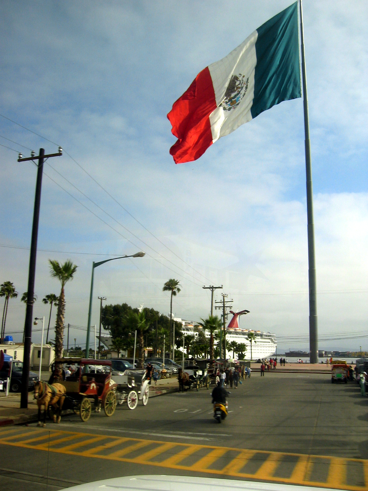 墨西哥下加里福尼亞州恩森納達市碼頭揭揚的巨幅墨西哥國旗。